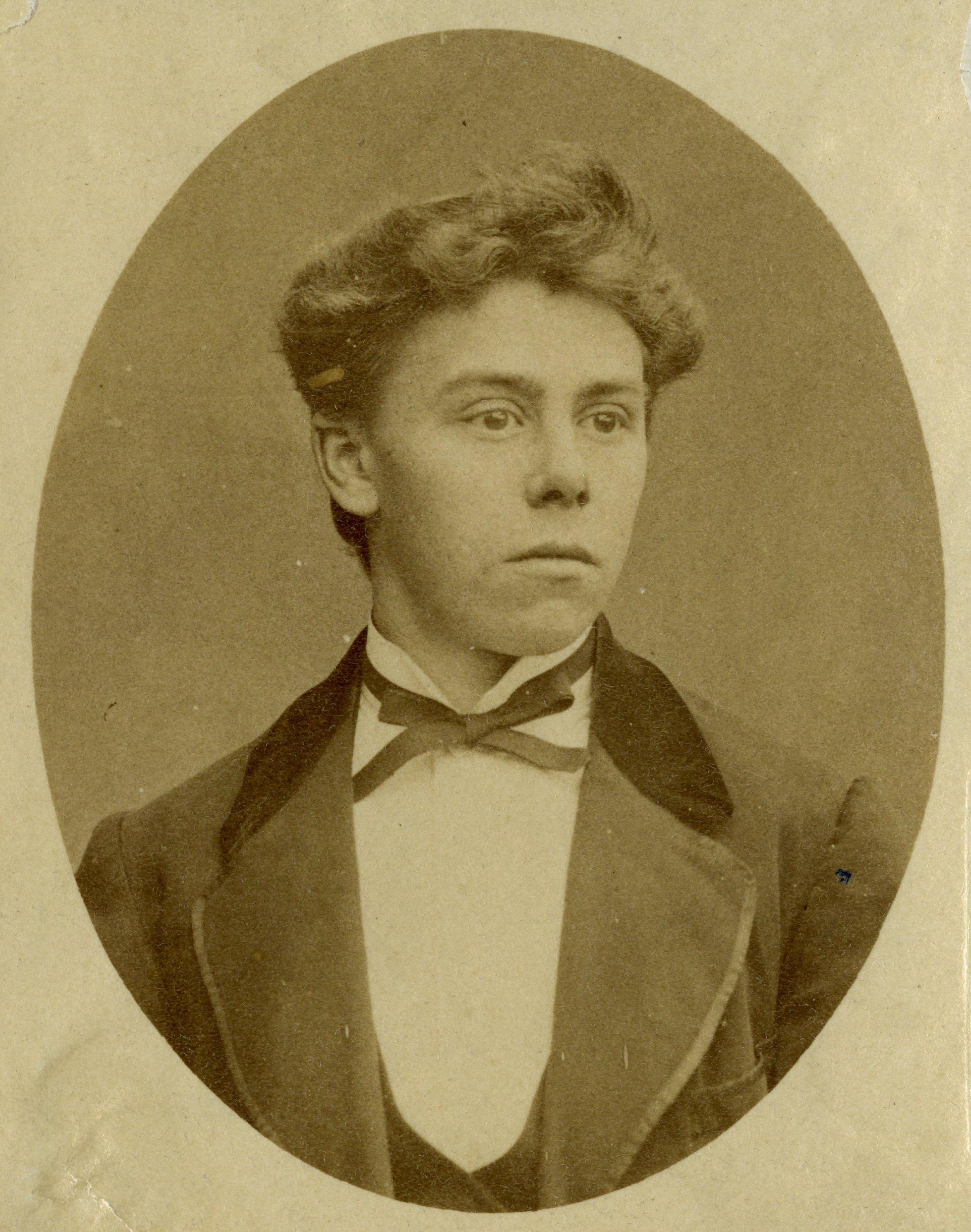 Hendrikus Jacobus Jut, moordenaar van mevr. van der Kouwen